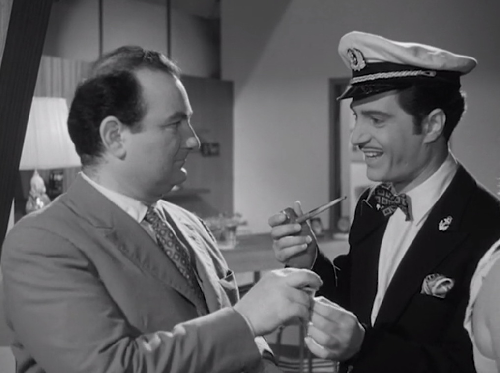 Screenshot dal film Tempo di villeggiatura (1956)